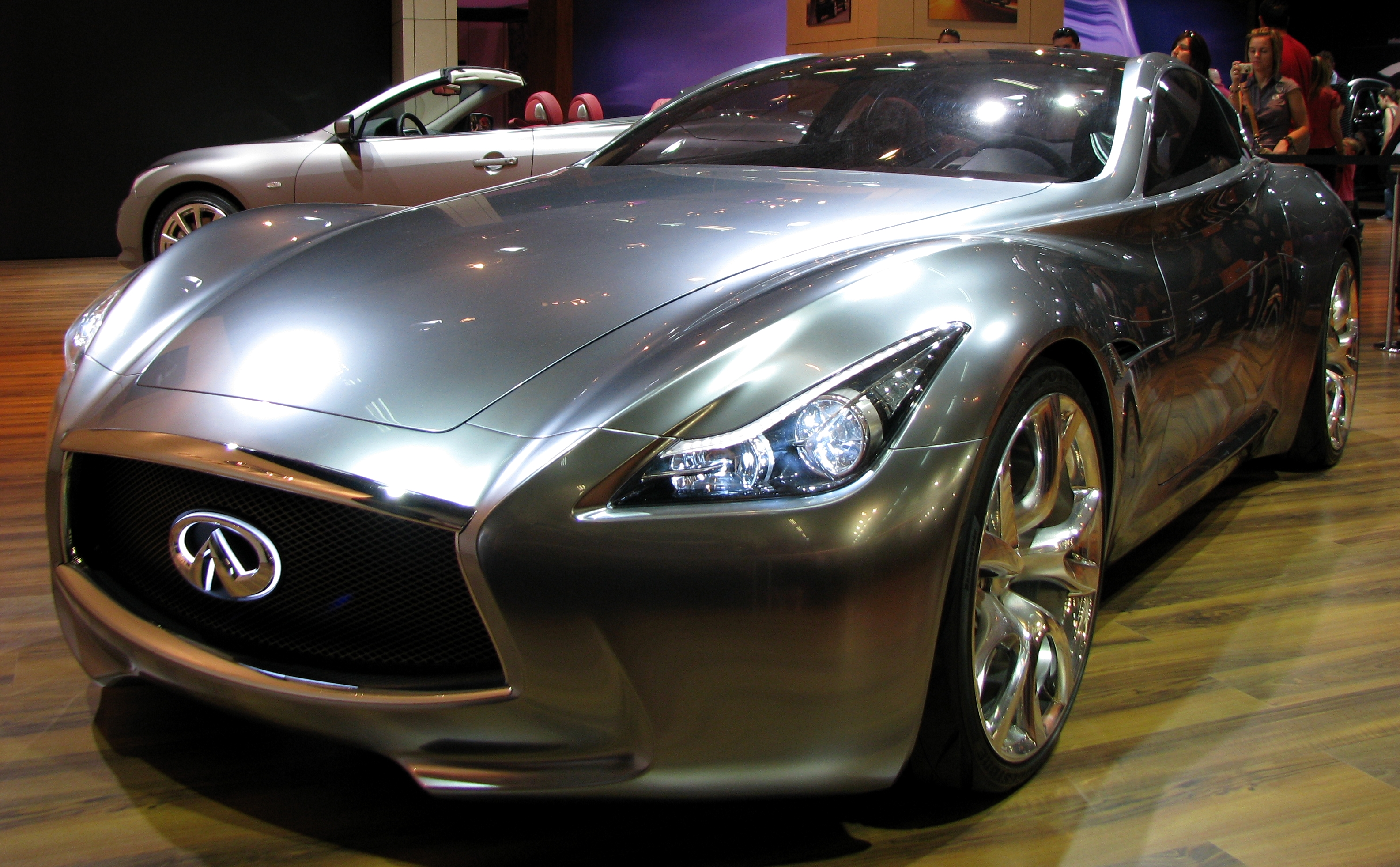 Prototipo Infiniti Essence en el Salón Internacional del Automóvil de Barcelona 2009.